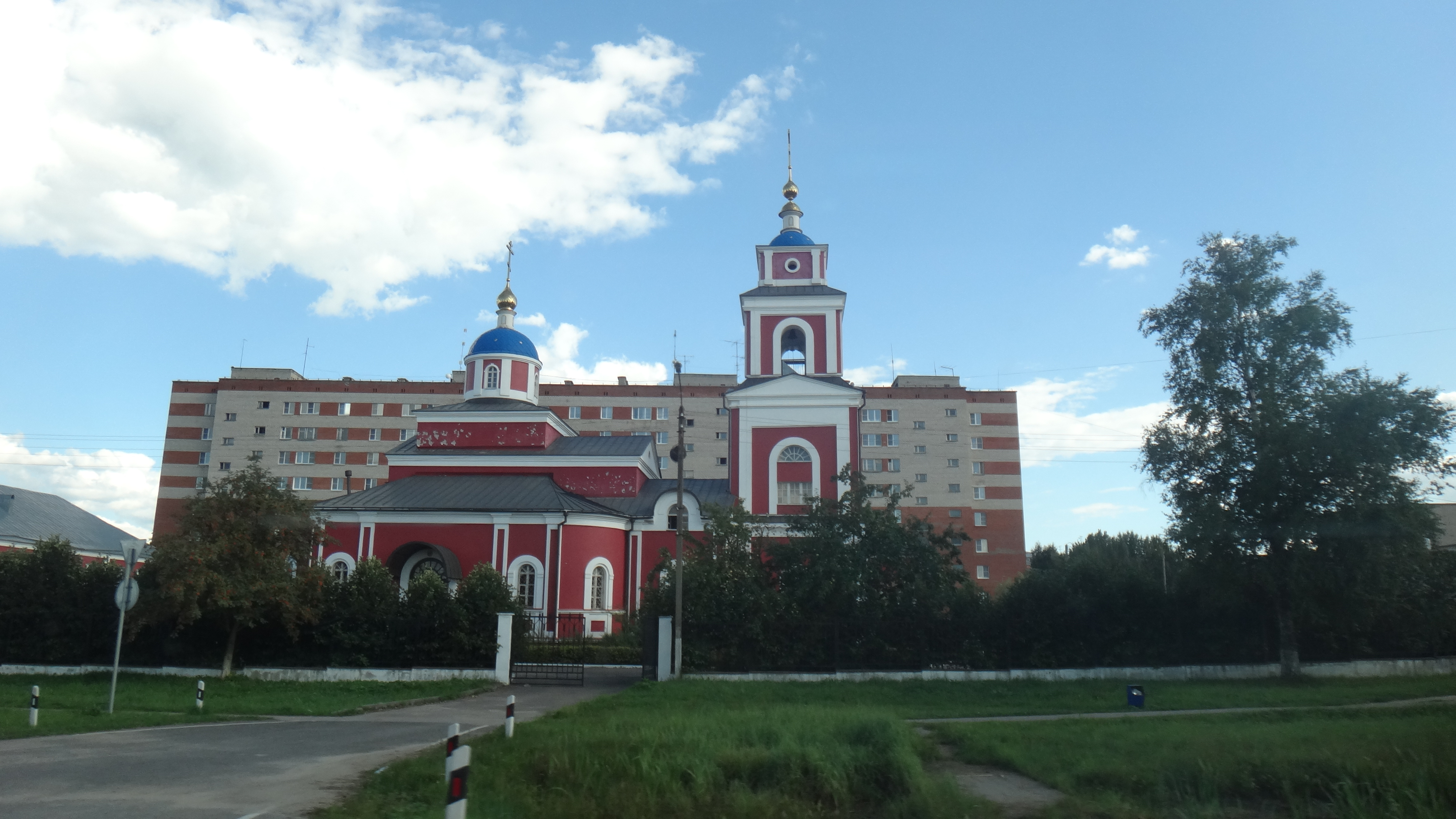 Belousovo, Kaluga Oblast, Russia